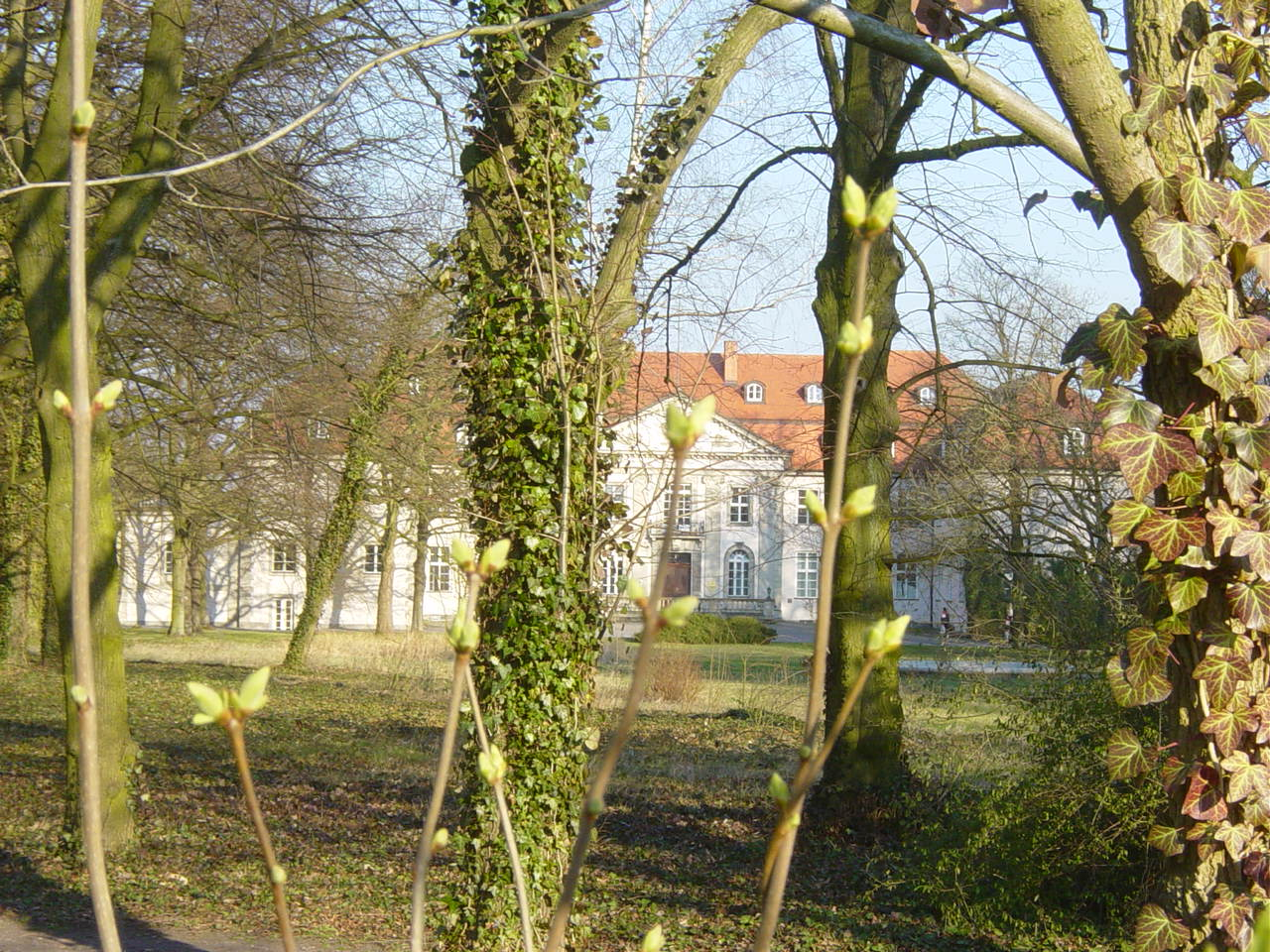 Herrenhaus des Bismarck-Gutes Schönhausen II